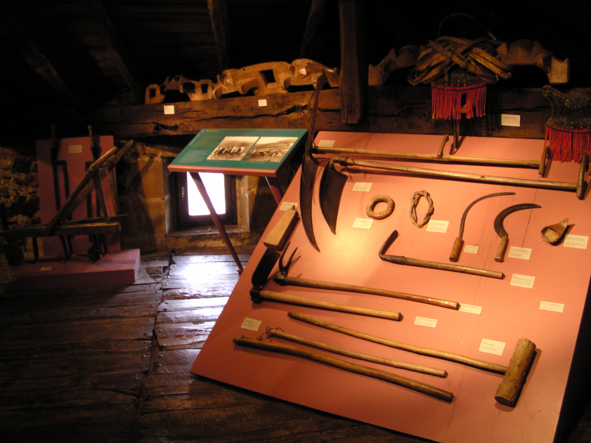 Herritarren doaitzari esker sortutako museoa. Zeraindarren bizitzeko erak izan duen garapenaren islada.